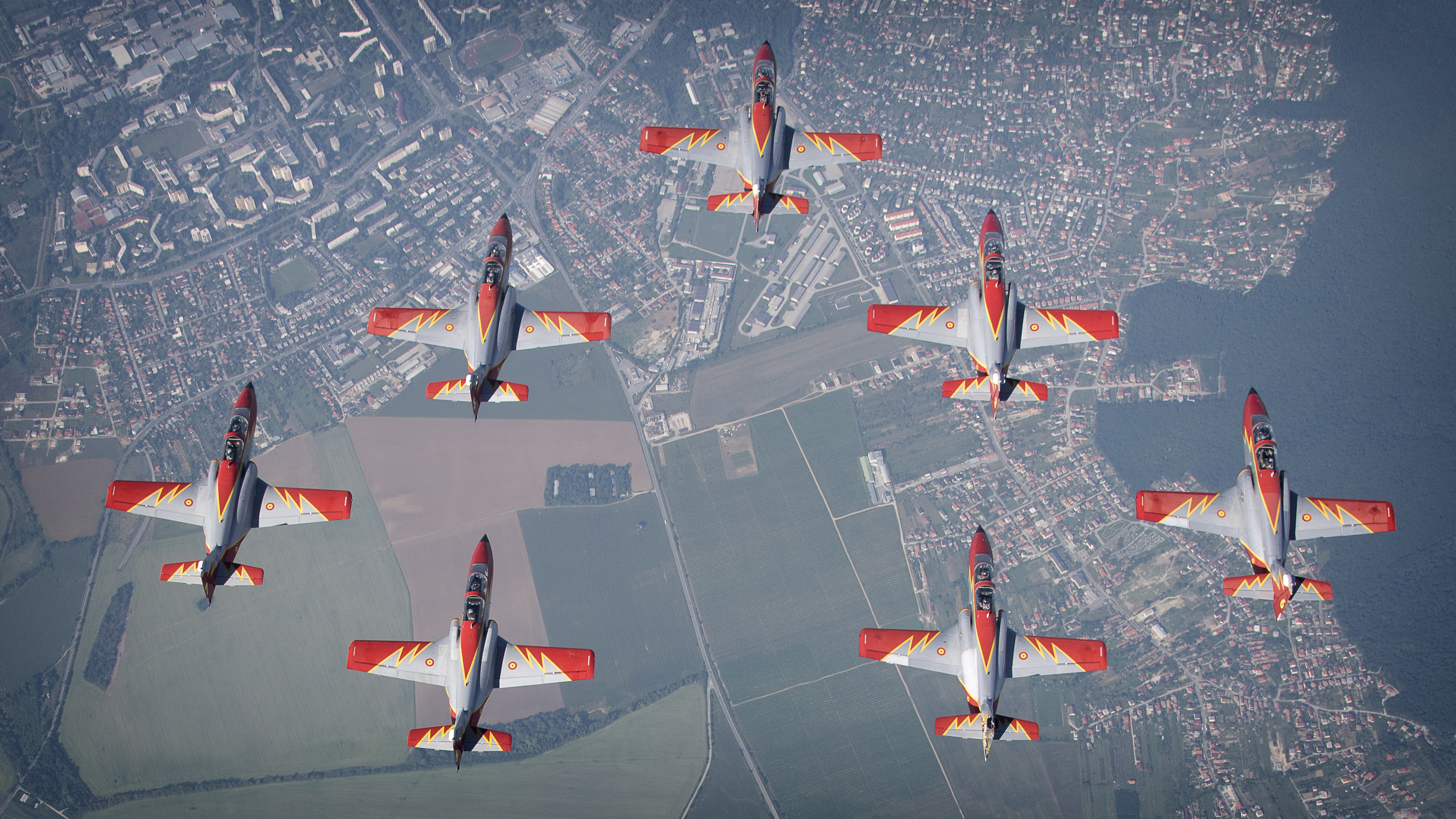 Fotos cedidas por Chen Peng de la participación de la Patrulla Águila en SIAF -Slovak International Air Fest- 2016 (Eslovaquia) y en Airpower 2016 (Zeltweg, Austria)